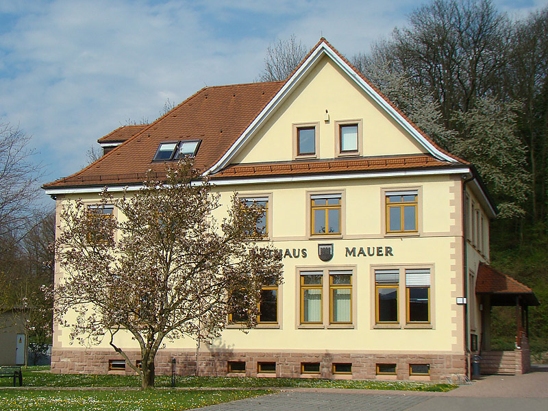 Rathaus in Mauer, Baden-Württemberg, Deutschland